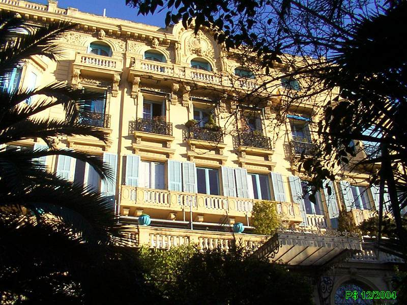 Les palais de Nice. Epoques diverses. Iconographie construit en 1906-1907. Architecte : Charles DALMAS Transformé en petite copropriété (date?)